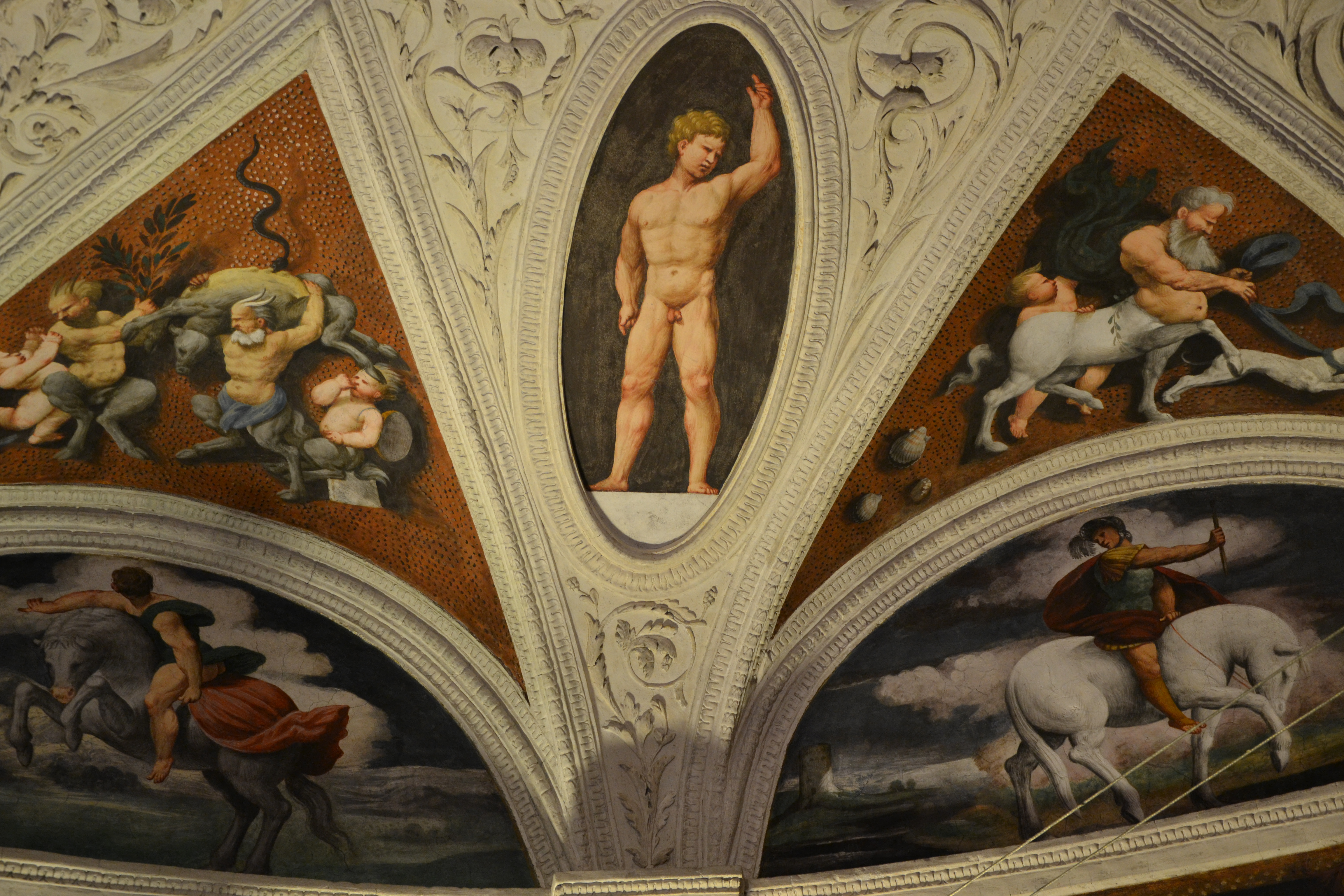 Decorazione della Camera terrena del Torrion da basso, episodi della vita di Giulio Cesare, Marcello Fogolino, 1533, Trento, Castello del Buonconsiglio